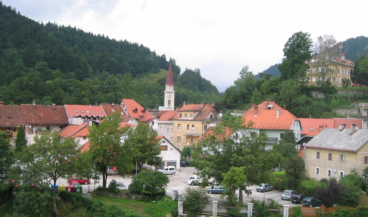 Tržič, Slovenia photo:Ziga 12:05, 21 October 2006 (UTC)